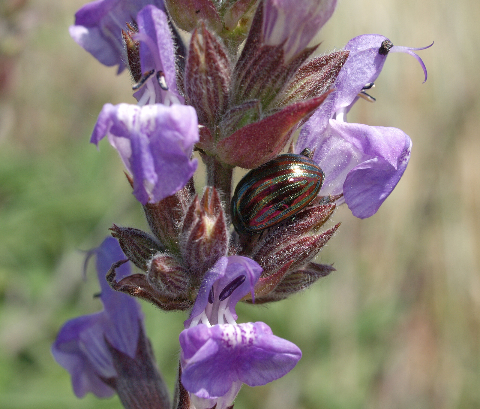 Chrysolina americana (Chrysomelidae), críptica sobre Salvia sp.